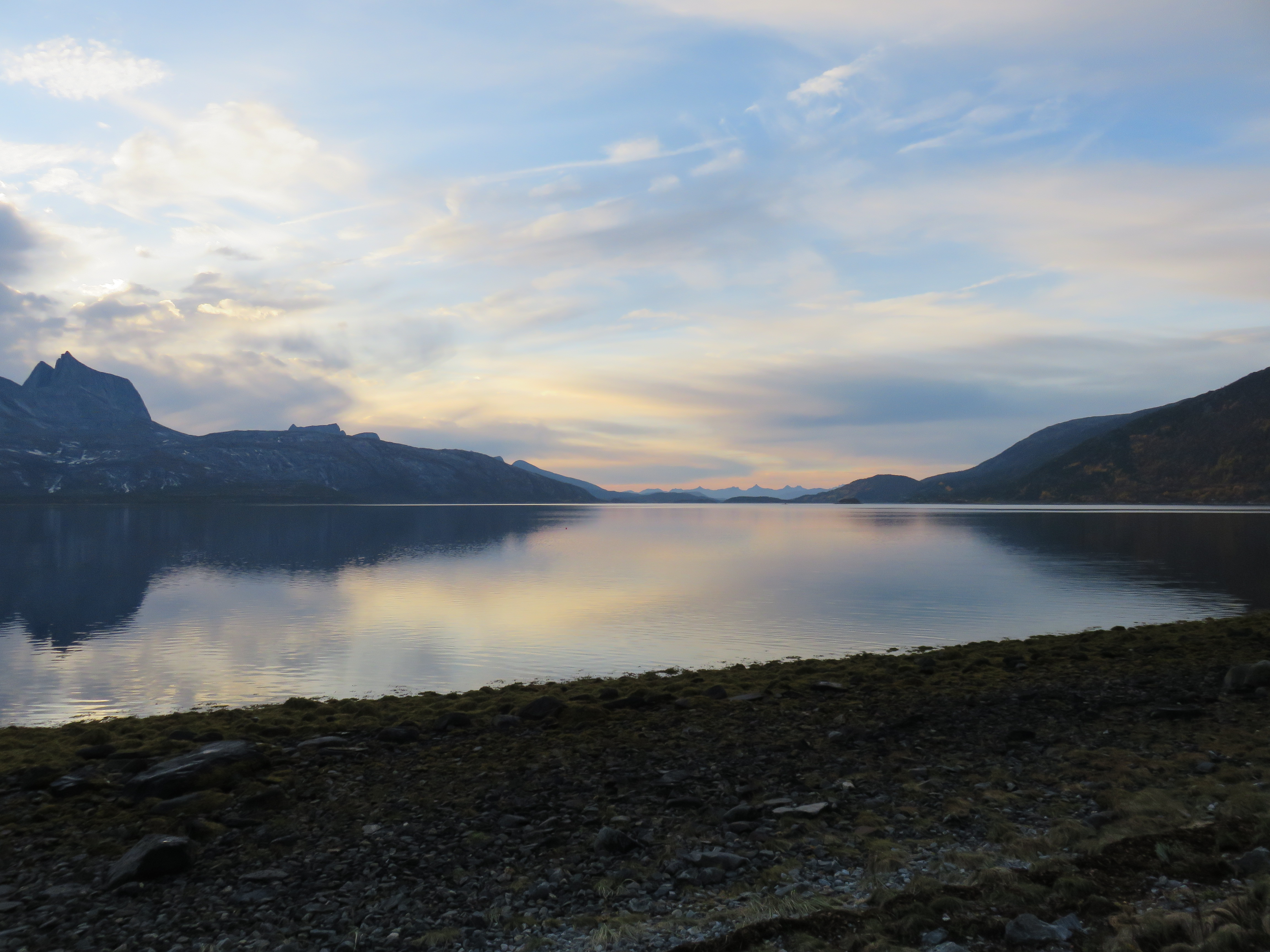 Forsahavet i Efjorden (Ballangen kommune) sett fra Forså.